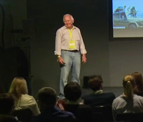 Find out more at: Unsere Zeit ist geprägt von der Suche nach Quests: Marathons laufen, sein Innerstes erforschen, epische Reisen unternehmen. In Zeiten, in denen tausende Deutsche zum Marathonlaufen nach NYC fliegen und der Wille nach persönlichen Herausforderungen ein absoluter Pluspunkt in jedem Bewerbungsgespräch sind, dreht sich vieles im Leben genau darum: Höher, Weiter, Schneller, Abenteuerlicher. Gunther Holtorf nimmt uns mit auf seine Reise: 900.000 Kilometer und 215 Länder in 26 Jahren. Gunther Holtorf Creative Commons Attribution-ShareAlike 3.0 Germany (CC BY-SA 3.0 DE)